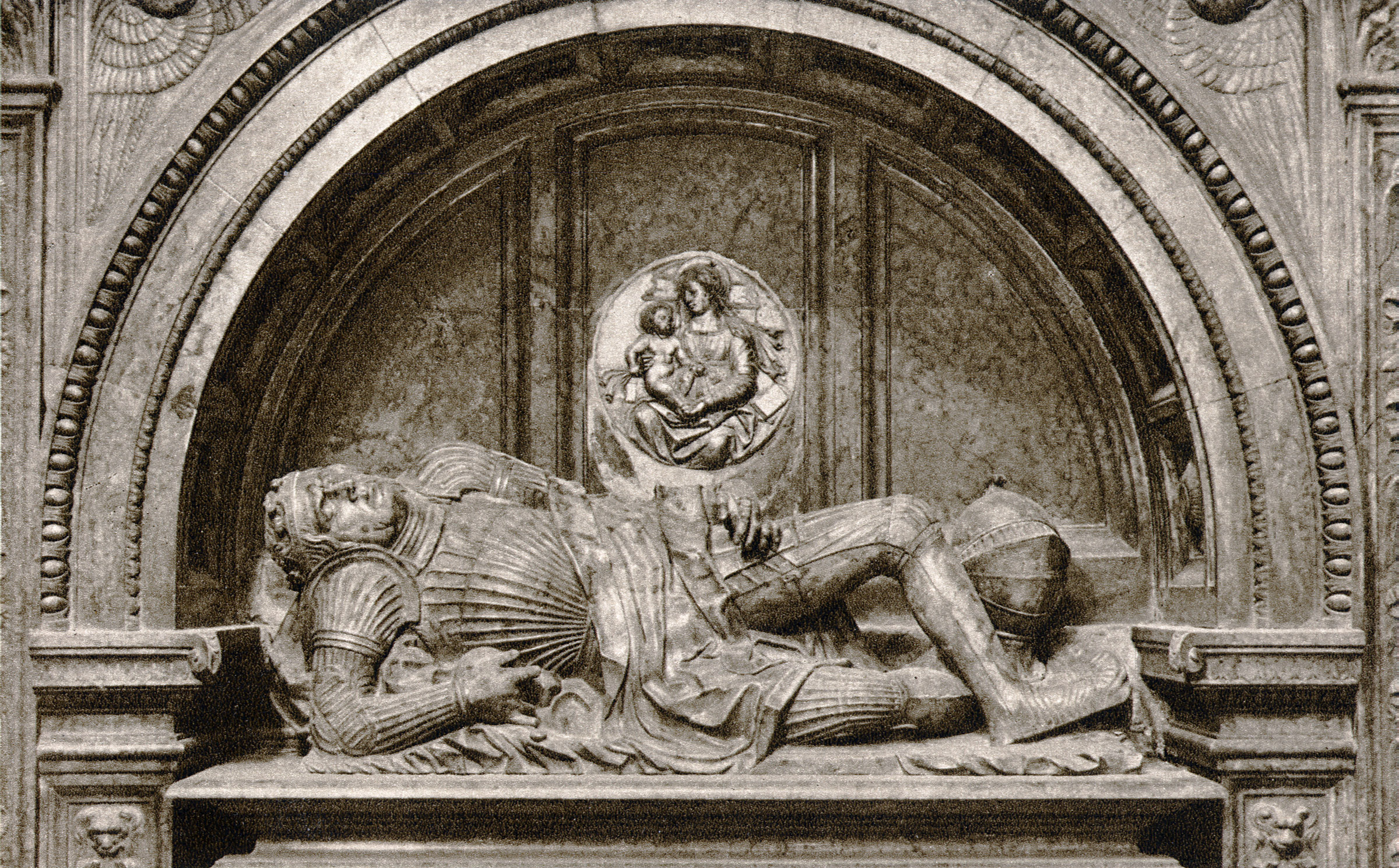 Nagrobek króla Zygmunta Starego w Kaplicy Zygmuntowskiej.